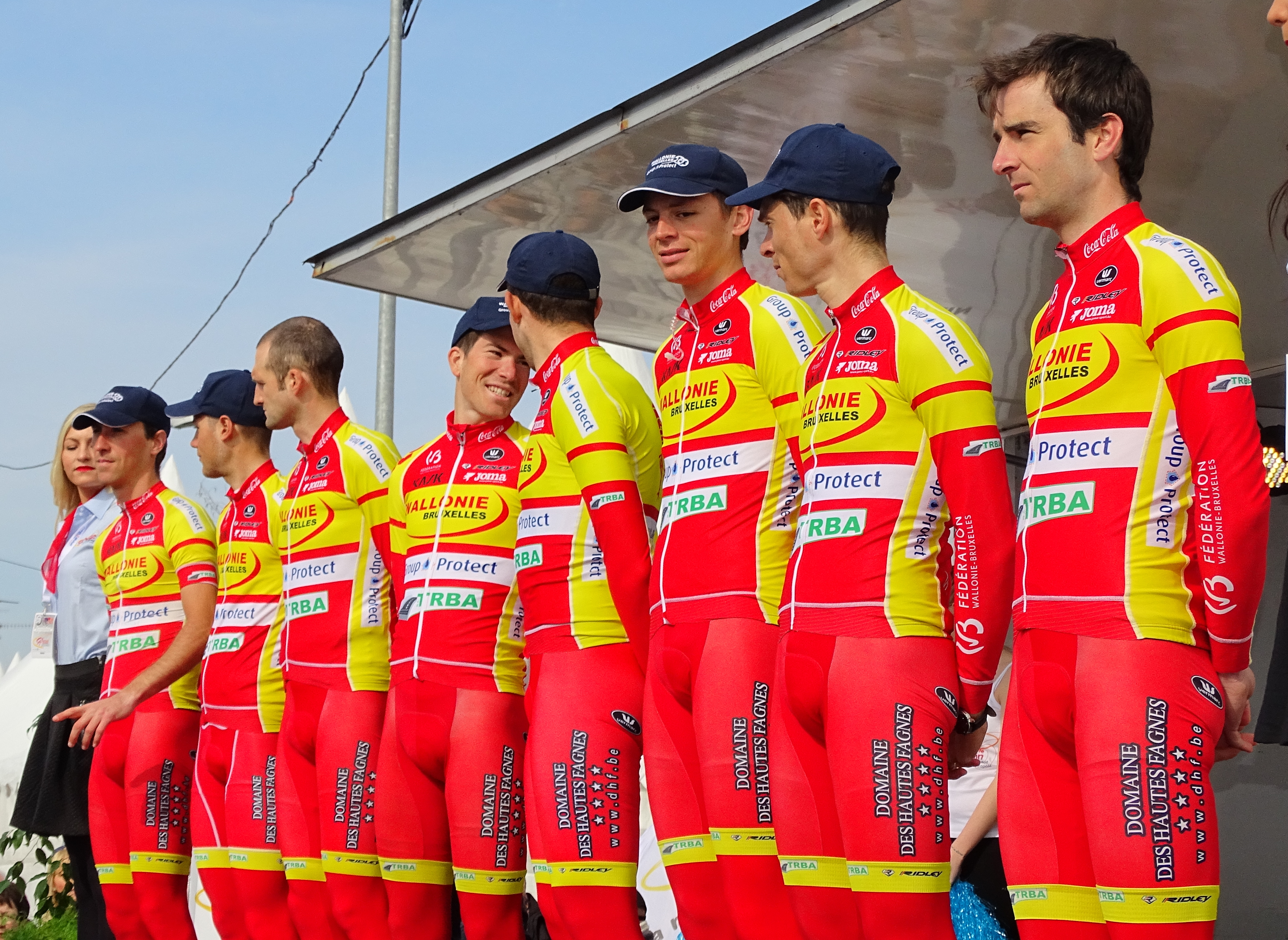 Reportage réalisé le jeudi 14 avril à l'occasion du départ et de l'arrivée du Grand Prix de Denain 2016 à Denain, Nord, Nord-Pas-de-Calais-Picardie, France.